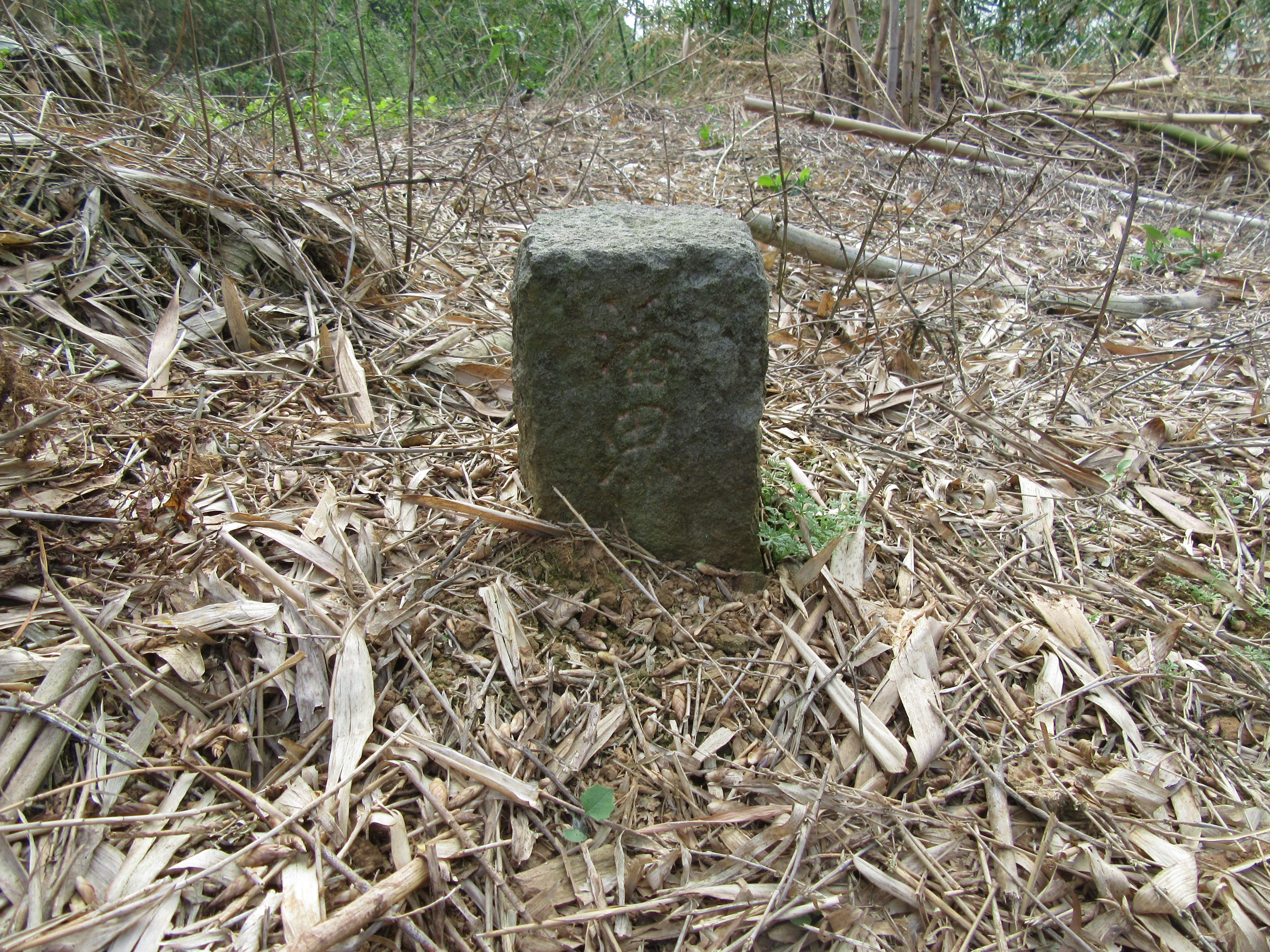 中文（台灣）: 潘界的番界碑